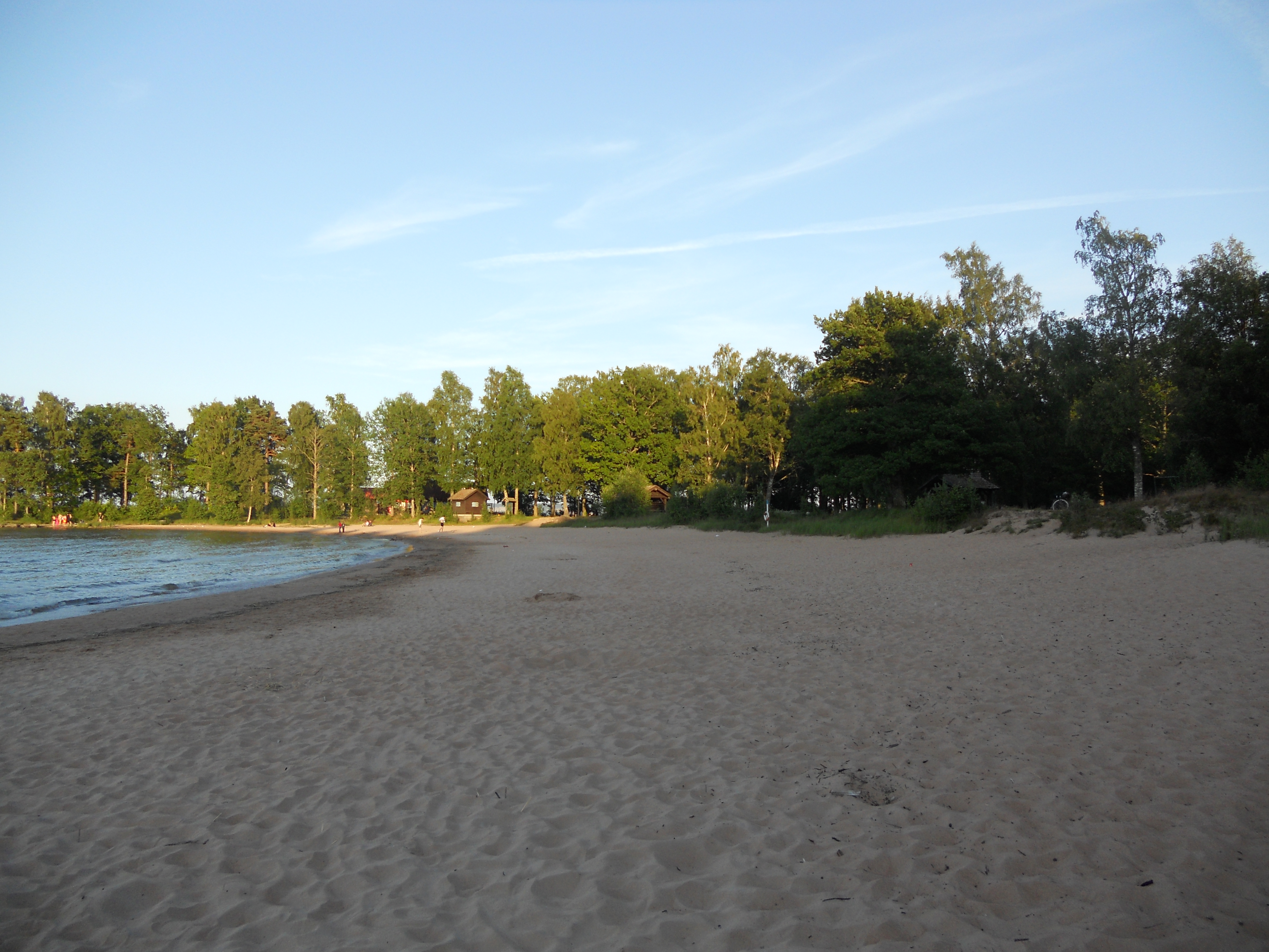 Ursand, Vänersborg.